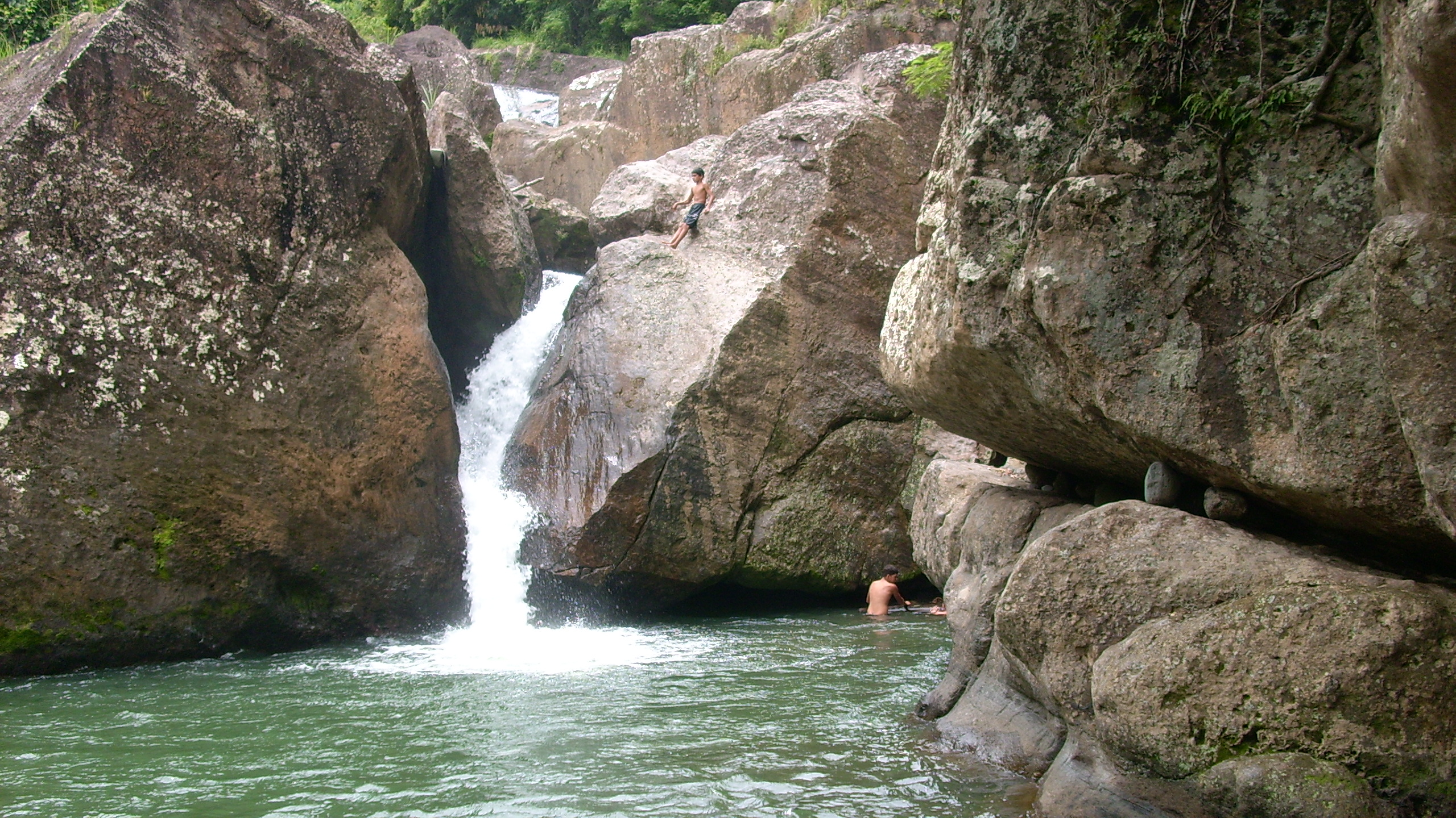 Cascada en rio Brazo de Buey, afluente del rio Buey, localizado en el municipio Buey Arriba, provincia Granma. Cuba